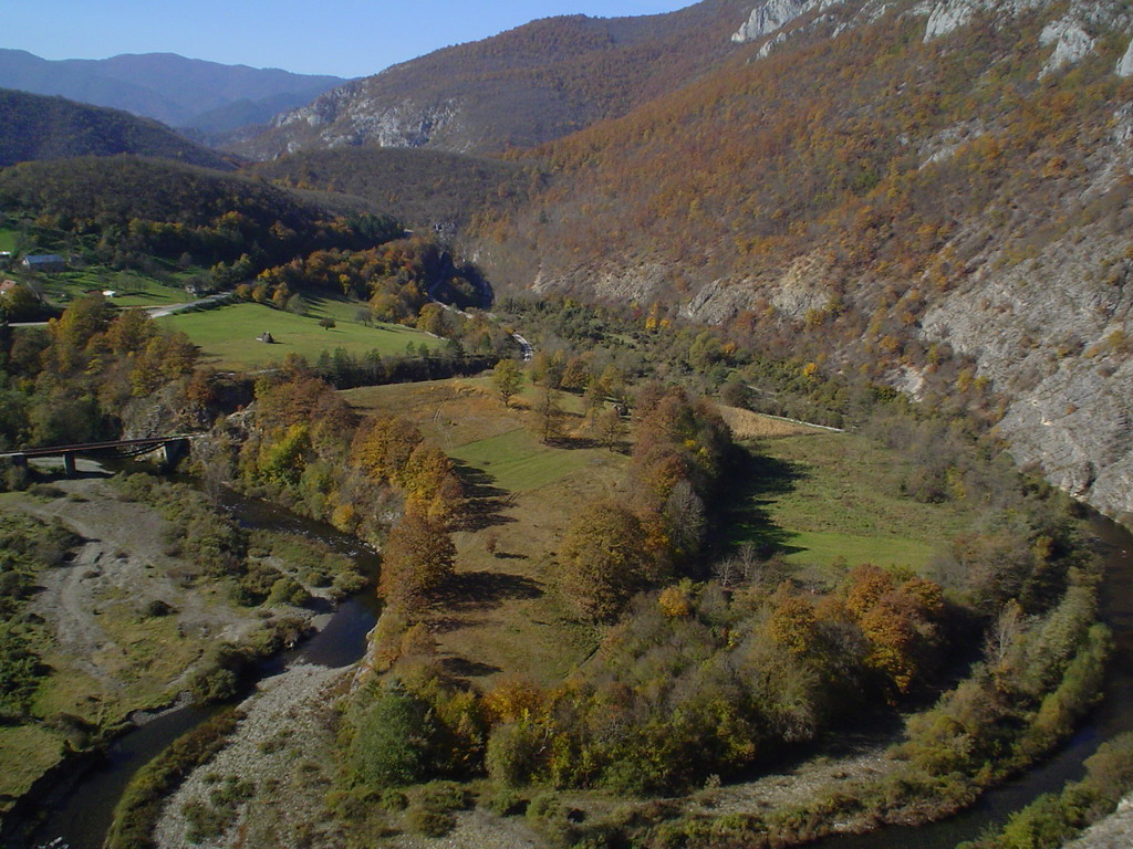 Le Rzav (Zlatibor) est une rivière de Serbie et Bosnie-Herzégovine